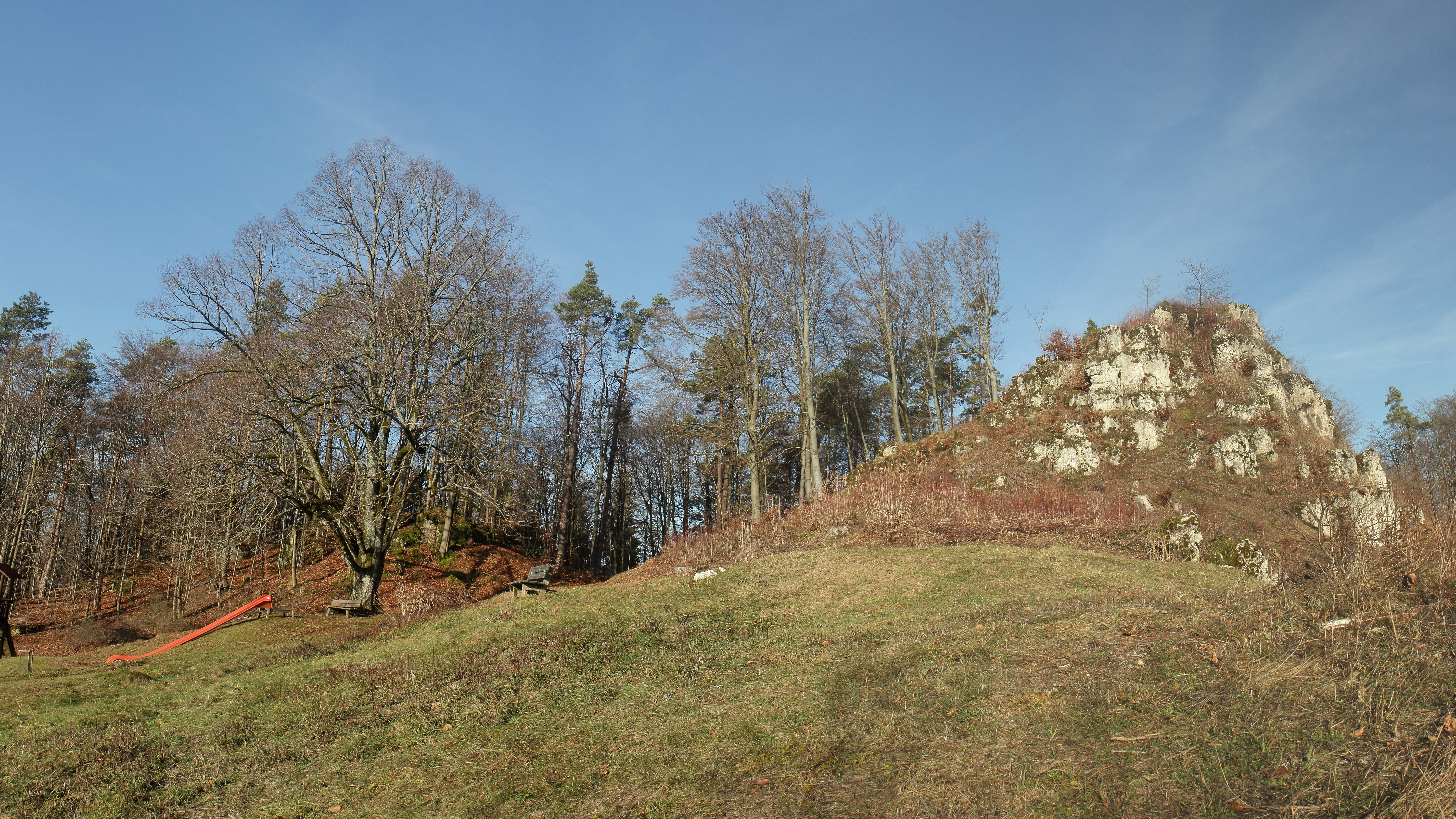 Burgstall Spies - Ansicht der Feldseite der Burg mit dem Fels, der die Hauptburg trug